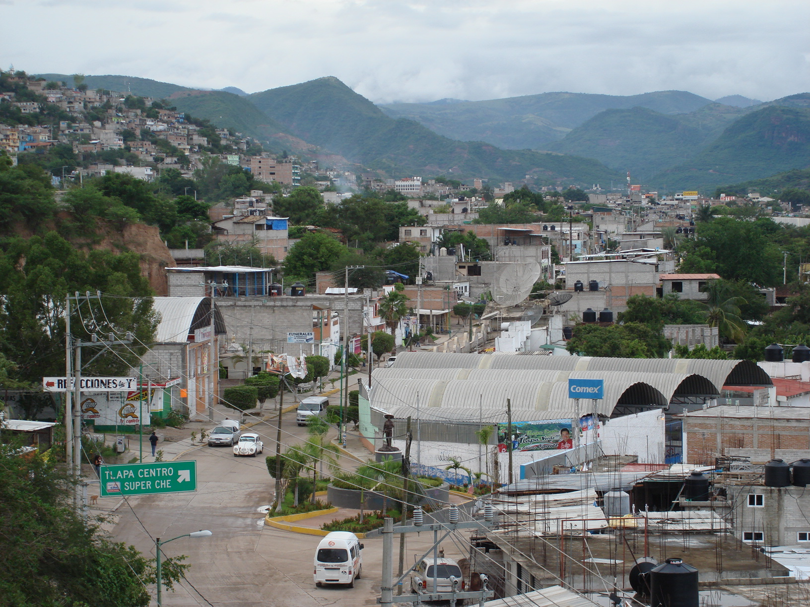 la entrada noroeste de tlapa